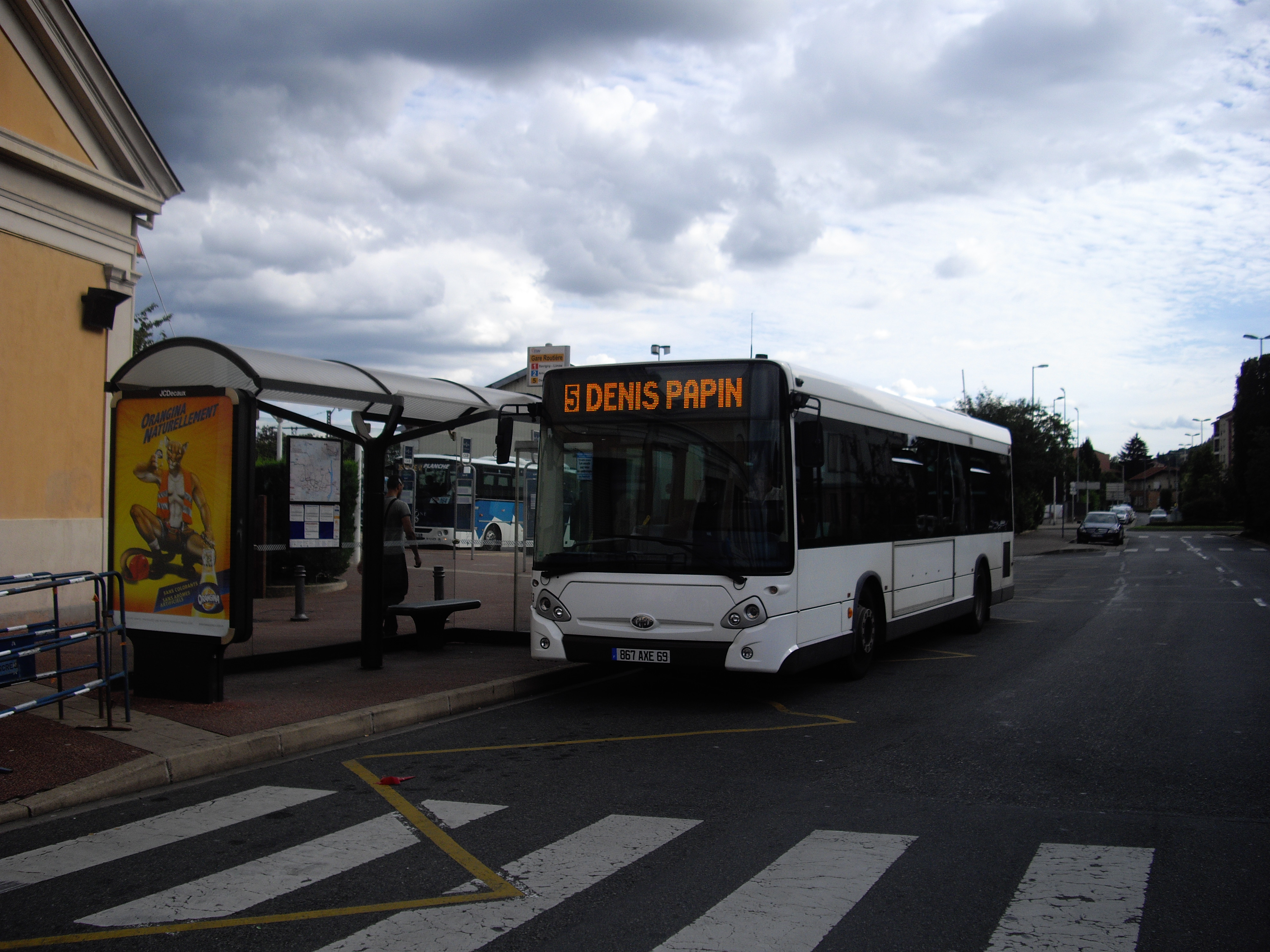 Heuliez GX327 - Villefranche-sur-Saône - Ligne 5 du Réseau Libellule, à la Gare.